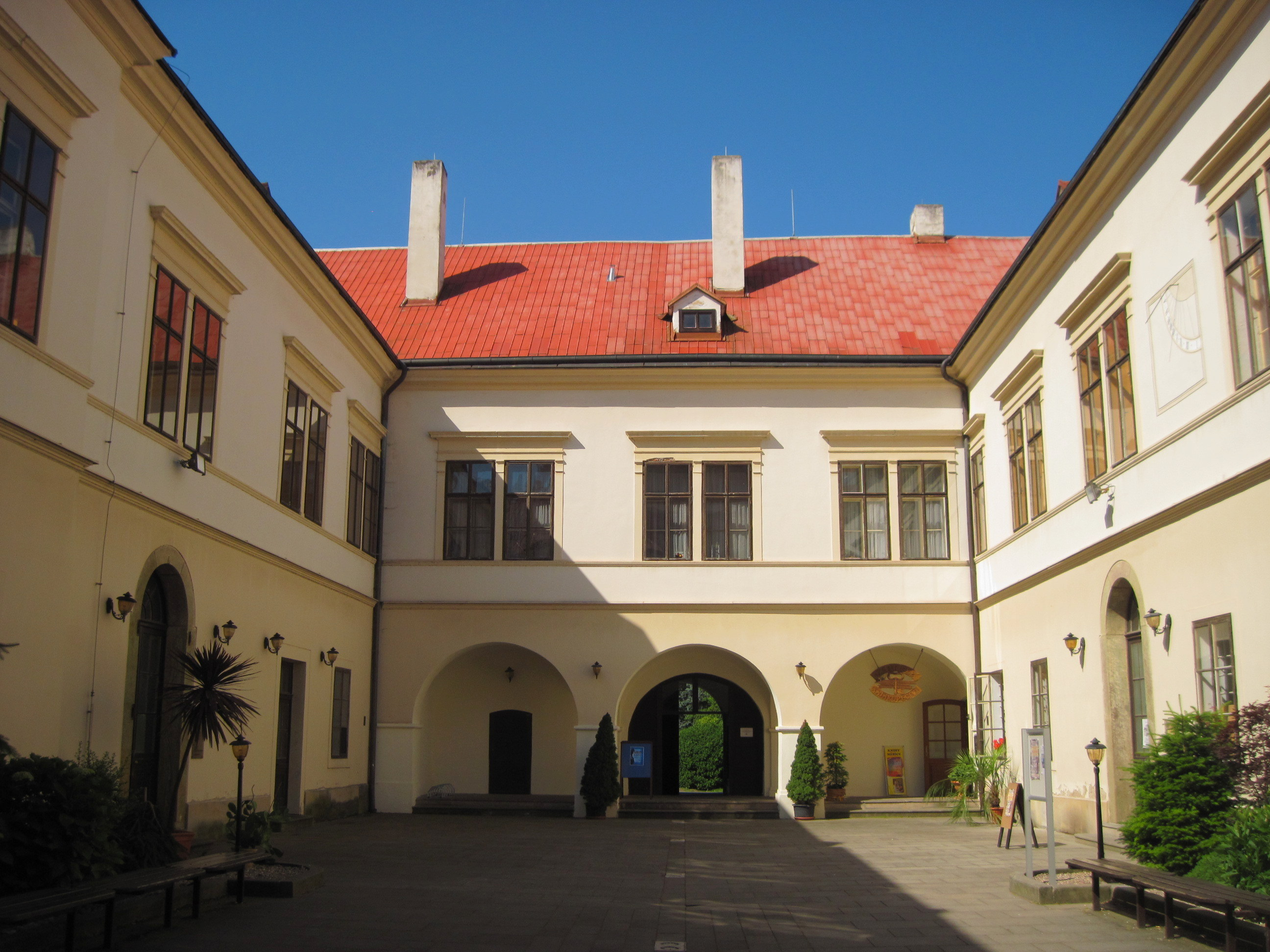 nádvoří